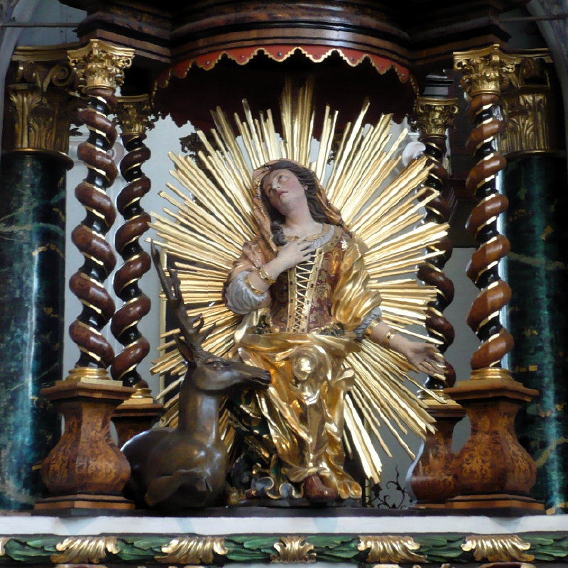 St. Idda, Statue bim Grab vo de Hailige im Chloster Füschinge